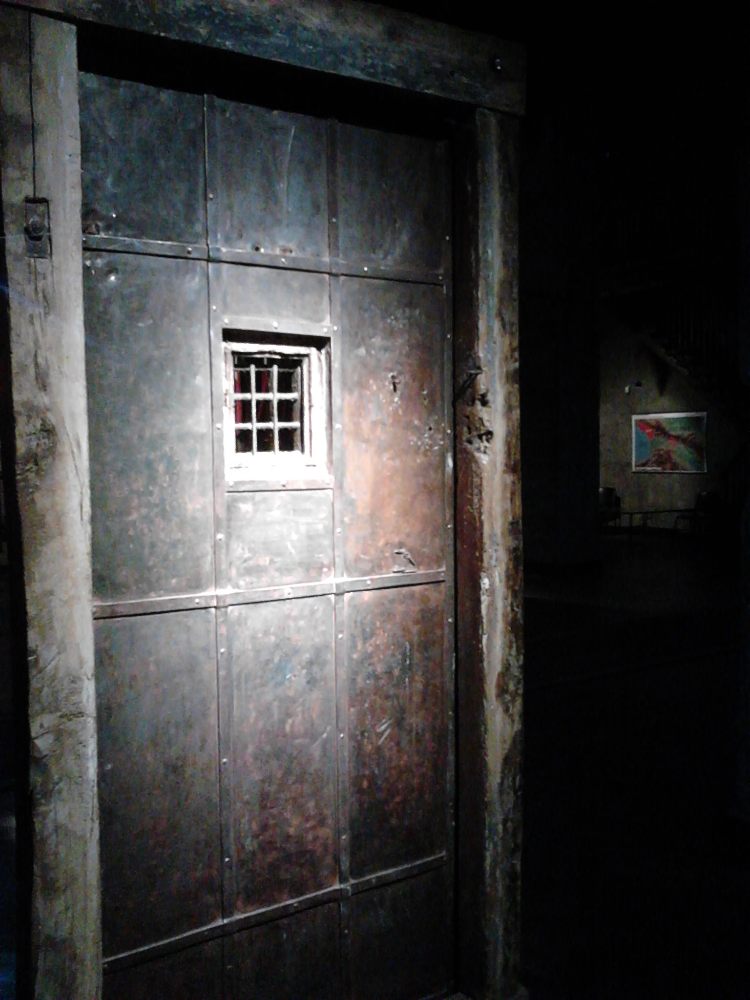 Prison door - exposition of the Museum of the Occupation of Georgia ციხი კარი - საქართველოს საბჭოთა ოკუპაციის მუზეუმი